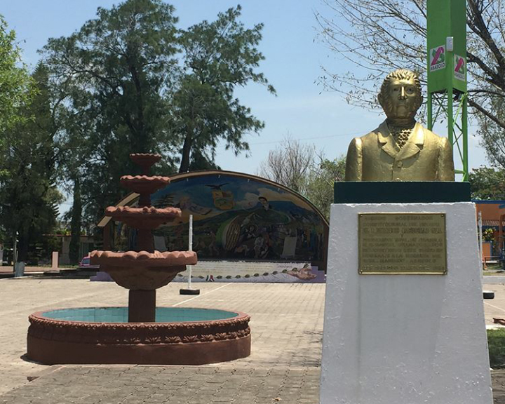 Plaza Cívica en Abasolo, Tamaulipas.